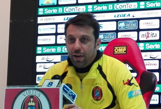 Roberto D'Aversa